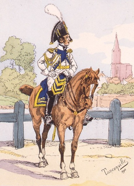 Colonel de la garde d'honneur de Strasbourg, 1809. Grande tenue.